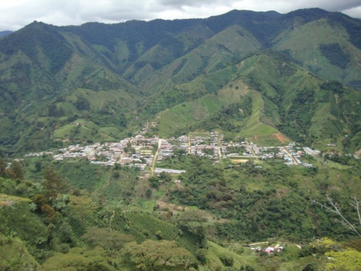 Herrera, Tolima, Colombia